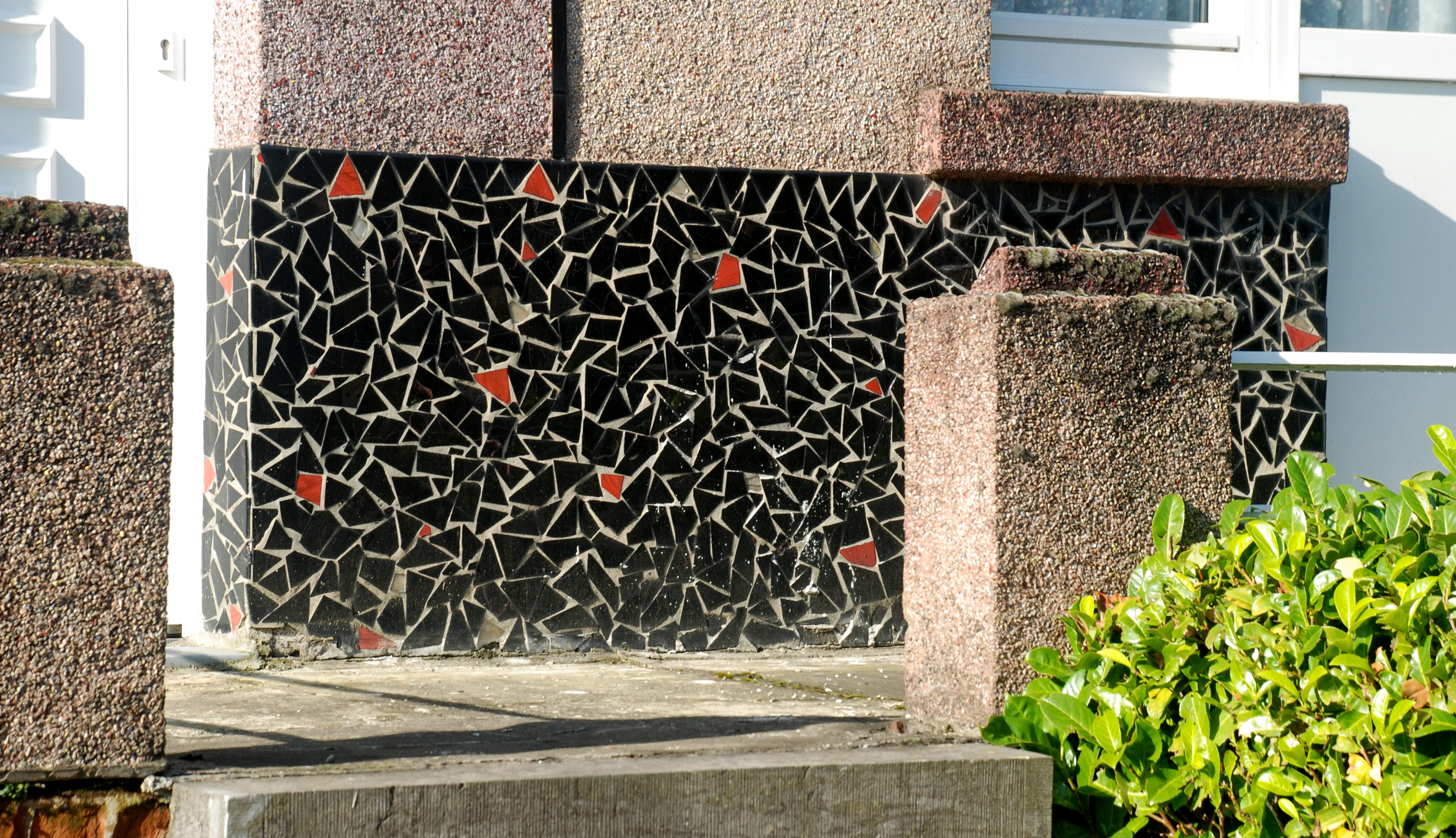 Belgique - Ottignies - façade en cimorné - Art déco